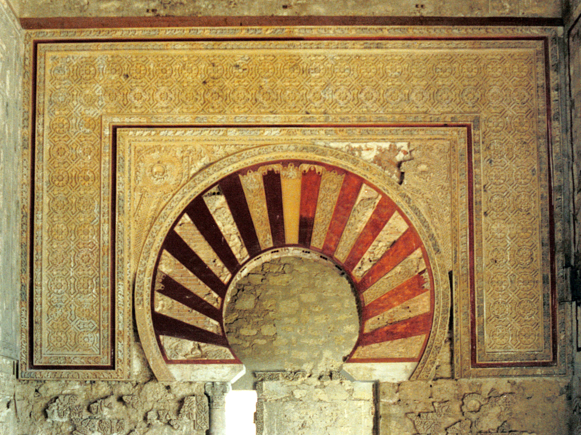 Medina Al-Zahra - Salon Rico